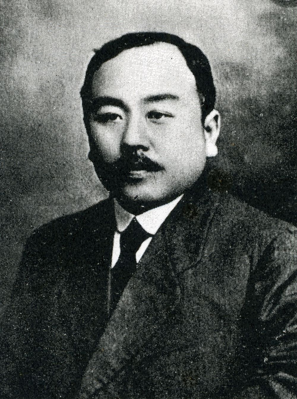 この写真は、広瀬徳蔵（1878-1933）の写真です。